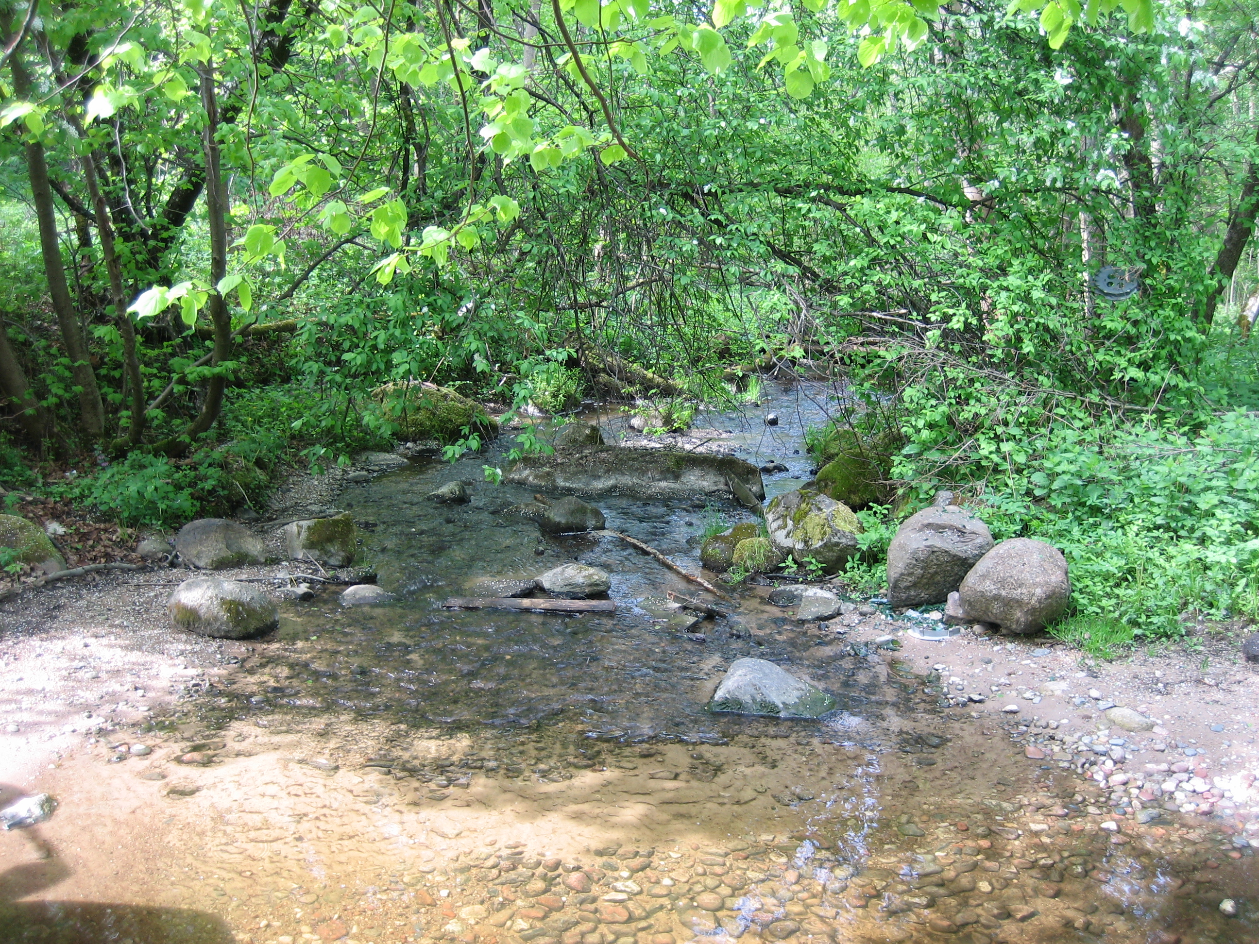 Čekonės upelis ties Čekoniškių gyvenvietę